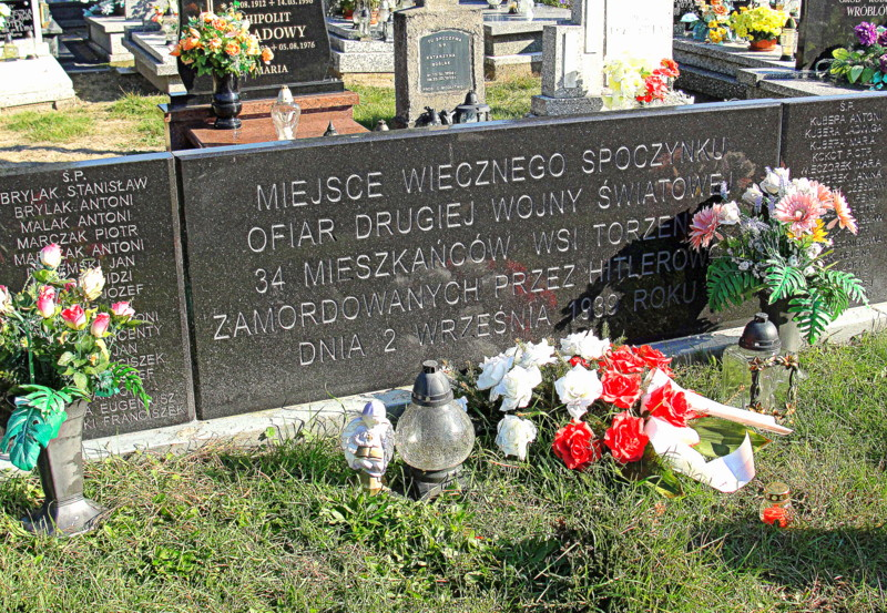 Wyszanów, cmentarz parafialny, mogiła pomordowanych cywilów przez żołnierzy niemieckiego Wehrmachtu we wrześniu 1939 roku(MW)